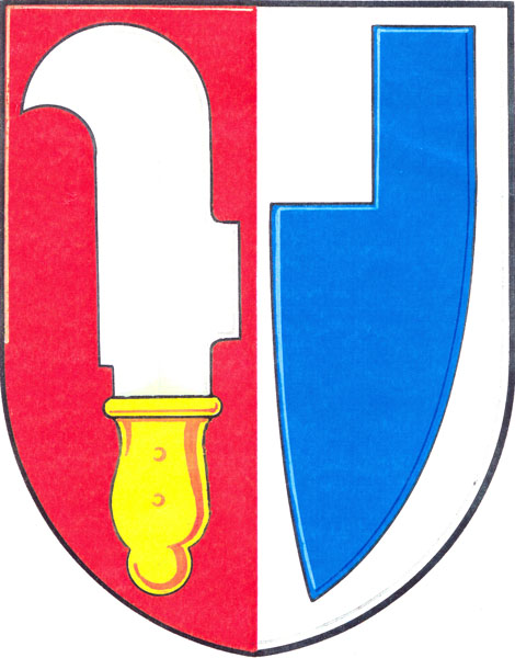 Znak obce Nebovidy